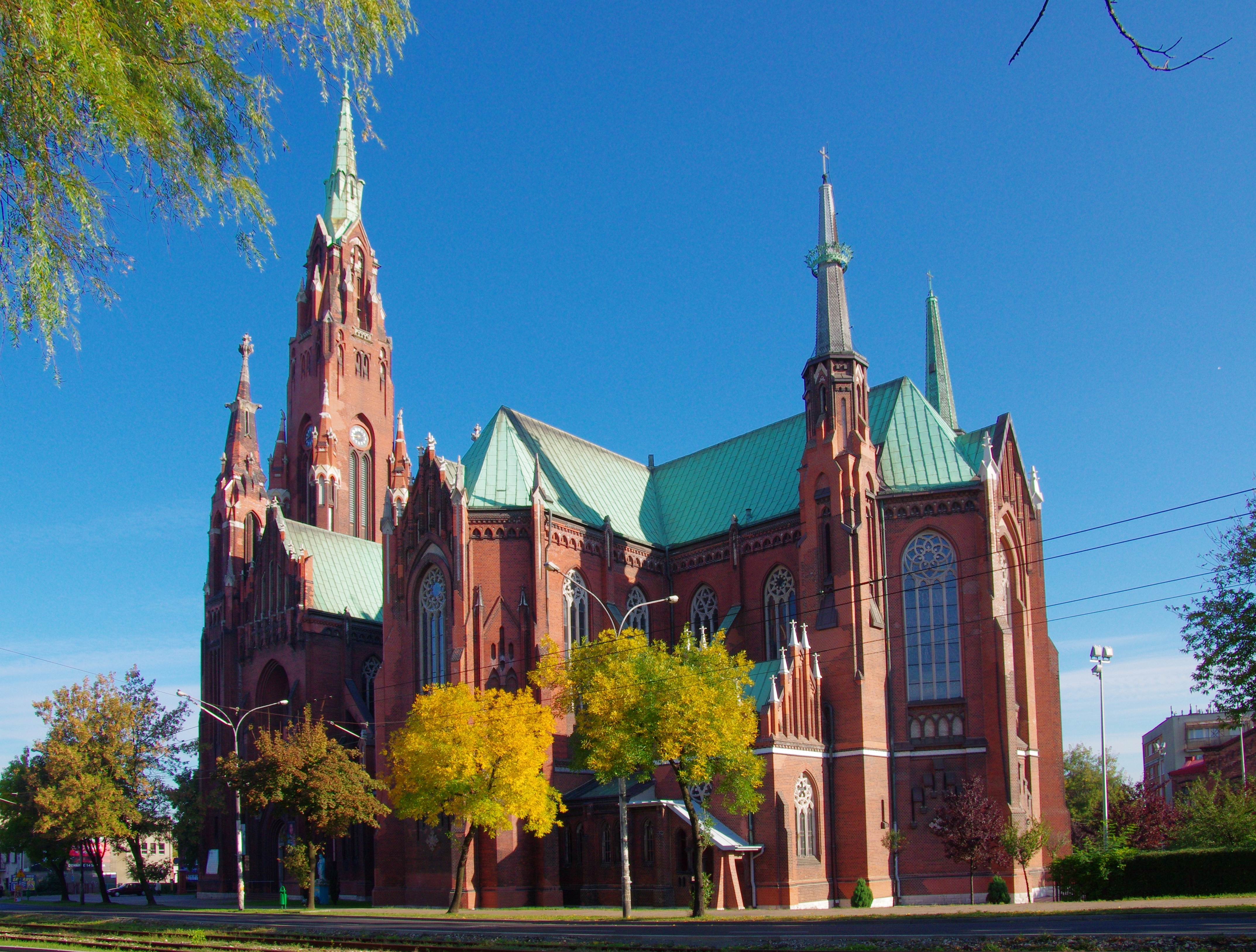 Dąbrowa Górnicza, ul. Królowej Jadwigi - Bazylika NMP Anielskiej